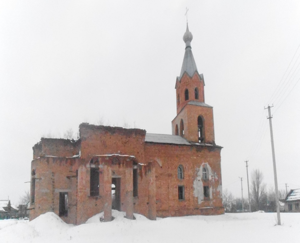 Вознесенська церква, Полтавська область, Решетилівський район, село Плоске